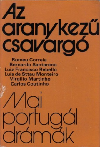 Tradução da peça O Vagabundo das Mãos de Ouro (1960) para húngaro.